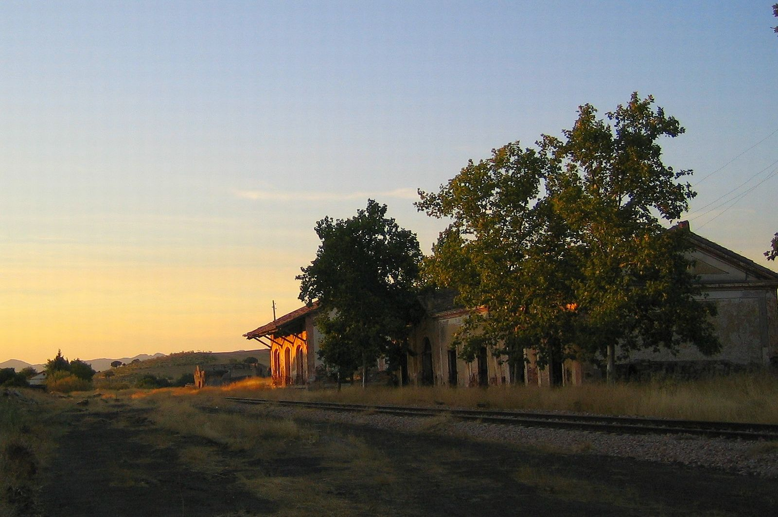 Gare abandonnée de Zujar de Cordoba Province de Cordoba Espagne